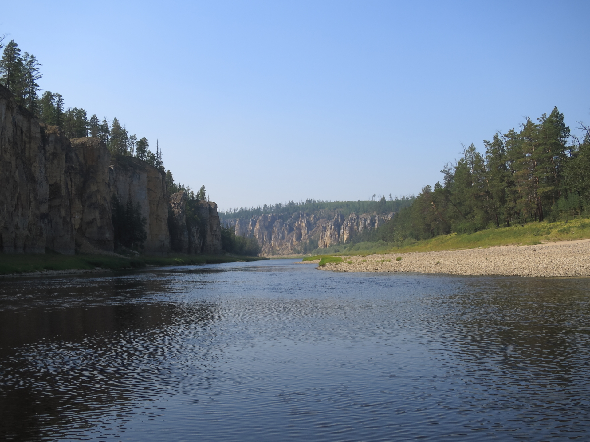 Сиинэ (Синяя), This image is related to the protected area of Russia number 1410003